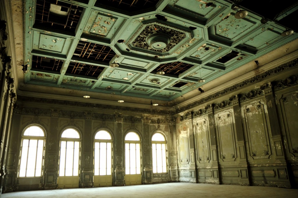 Sala do Conservatório antes da restauração. O local é sede oficial do Quarteto de Cordas da Cidade de São Paulo. Durante muitos anos abrigou o Conservatório Dramático e Musical de São Paulo.